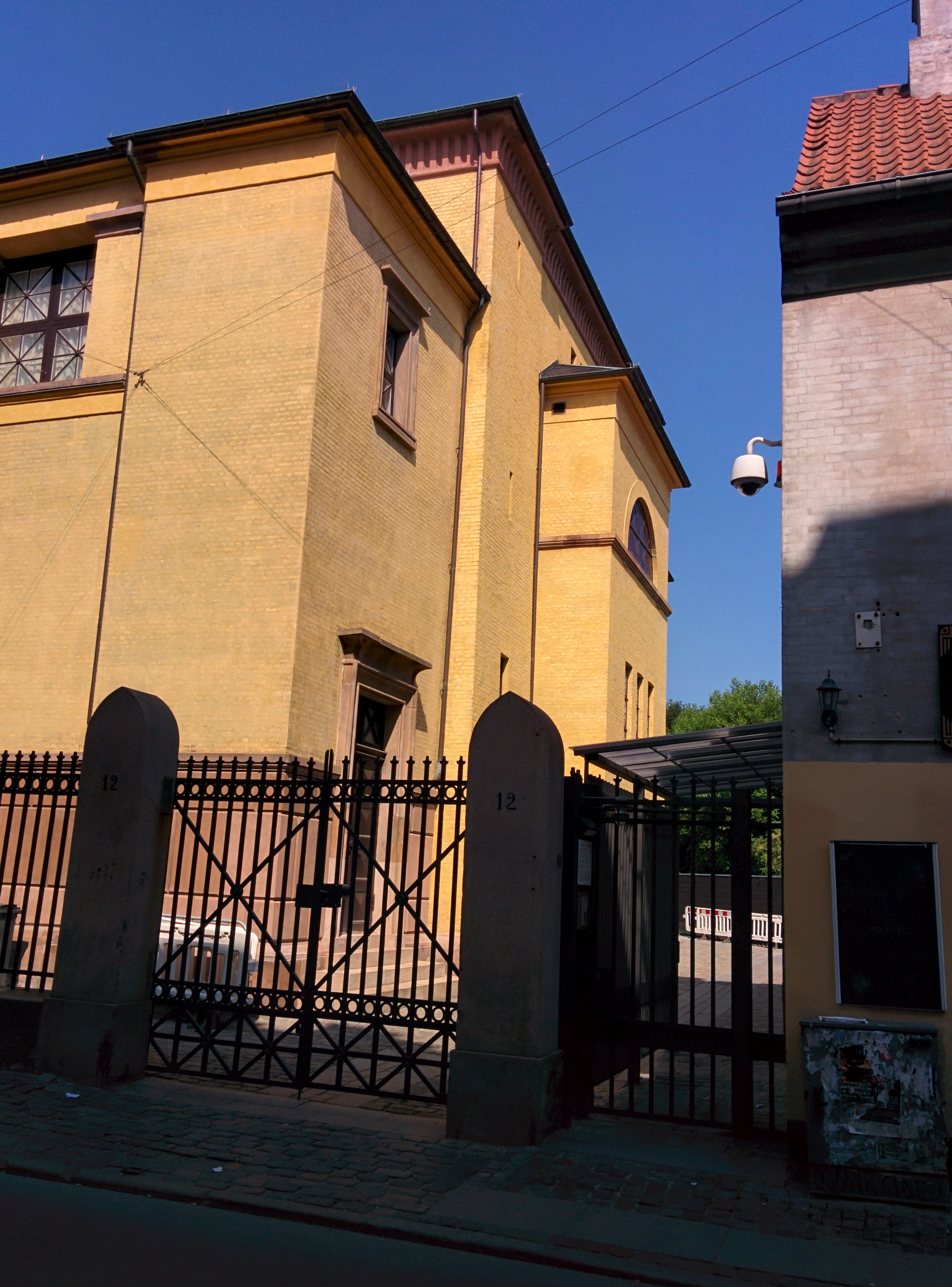 Billede af Københavns Synagoge, taget fra krystalgade.